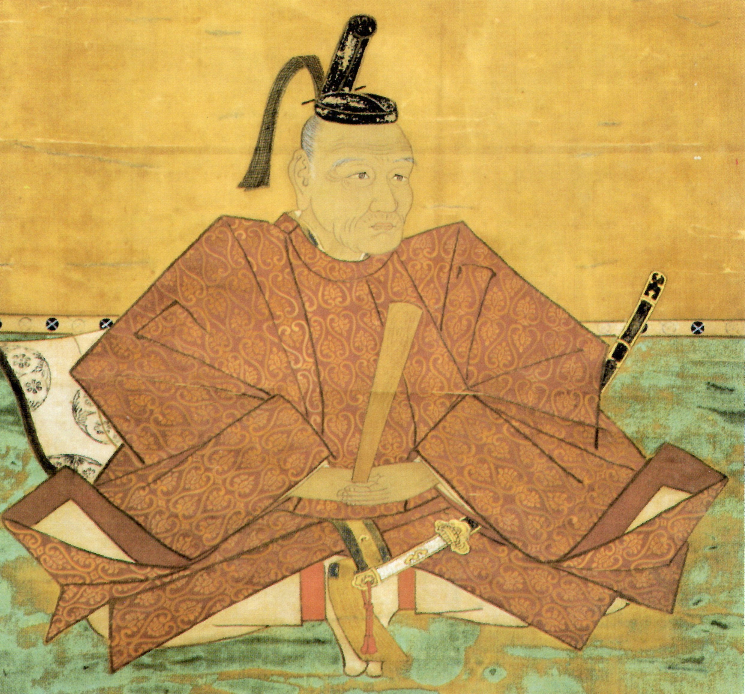 青木一重の肖像。